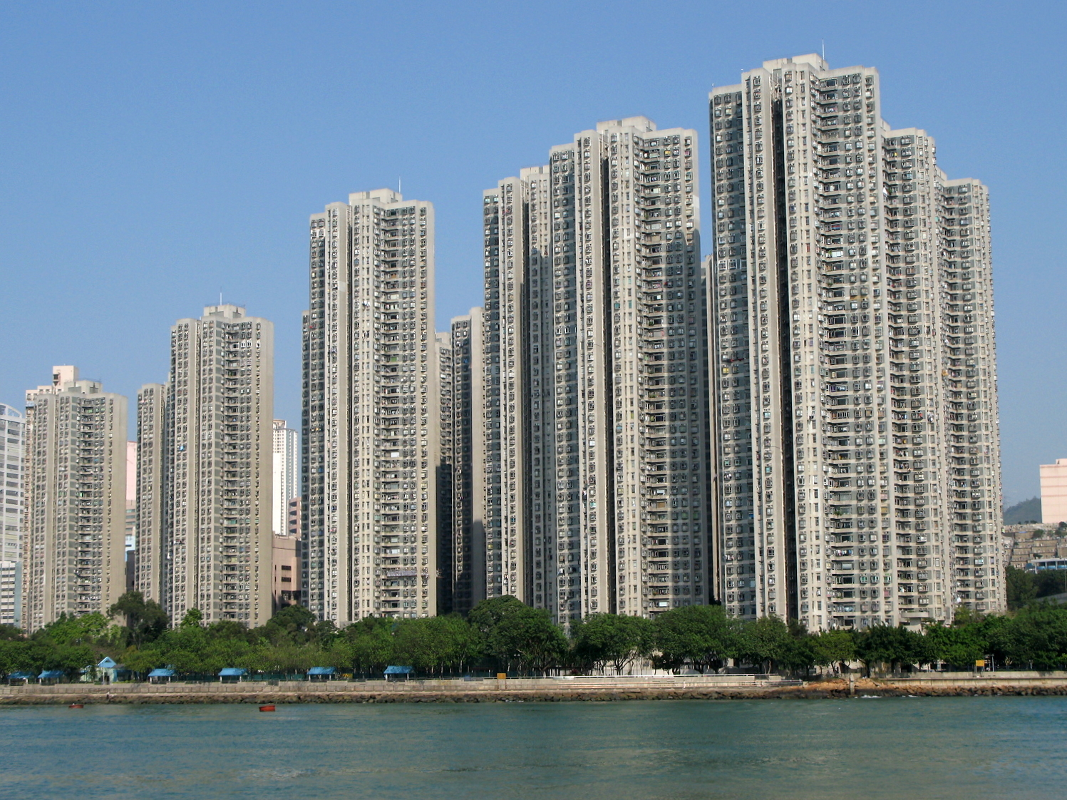 HK Riviera Gardens 海濱花園